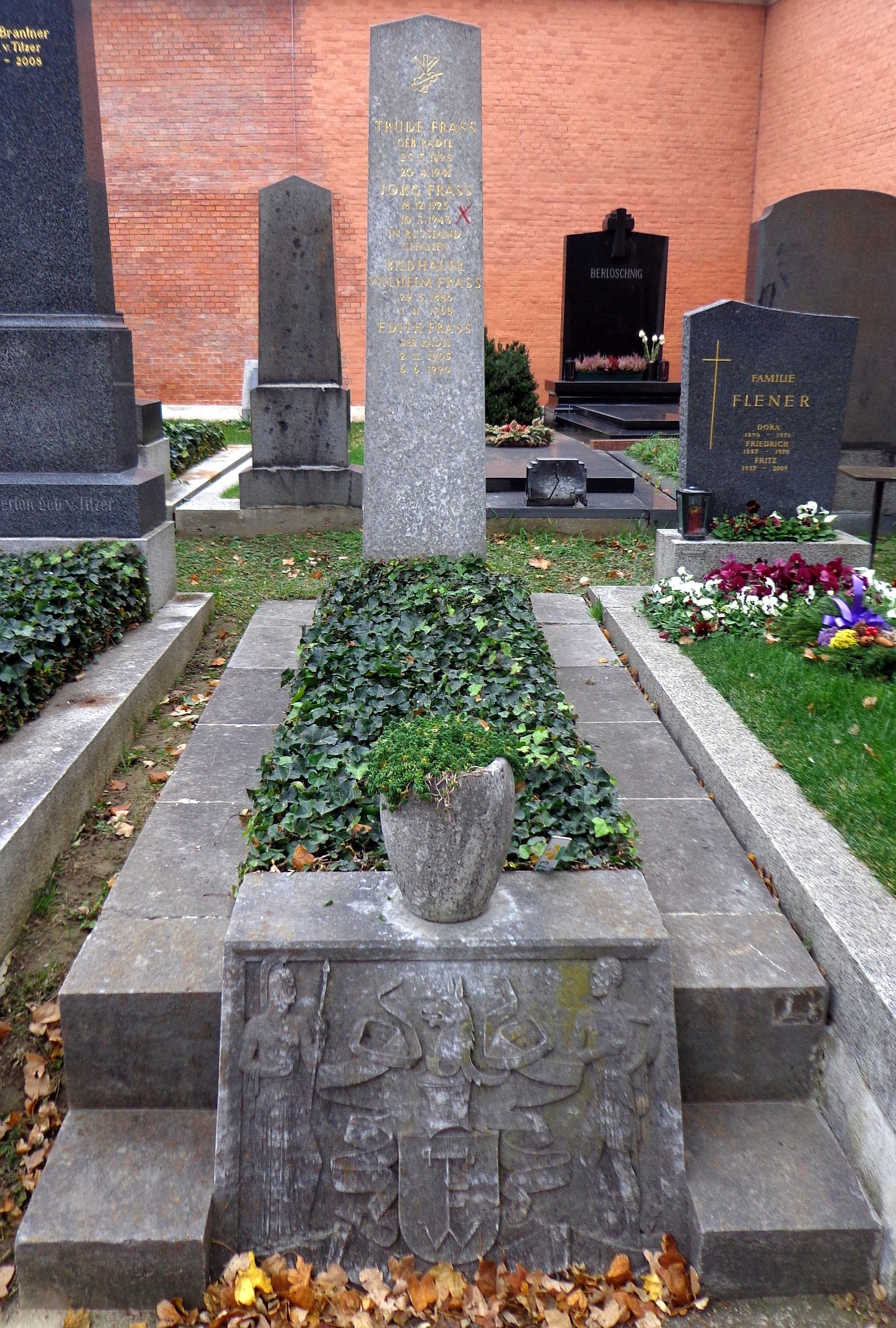 Wiener Zentralfriedhof - Gruppe 31A: Grab des Bildhauers Wilhelm Frass und seiner Familie